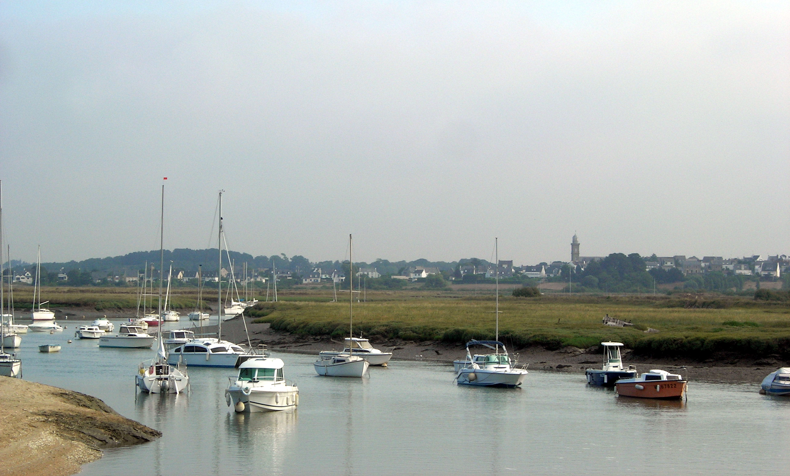 Description =Le port de Pen Laan à Billiers. Rivière Saint-Eloi Source =Photo taken by Remi Jouan Date =Aout 2006 Author =Remi Jouan